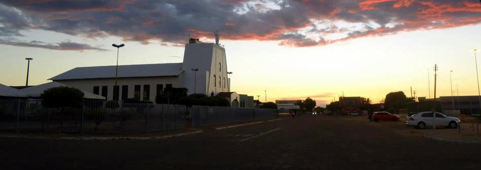 Entardecer Mozarlândia Igreja Matriz